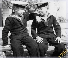 Mekteb-i Fünun-ı Bahriye-i Şahane'de Bir Ders (Bahriyeli Ali Sami'nin 1900'lü yıllarda çektiği bir fotograf)